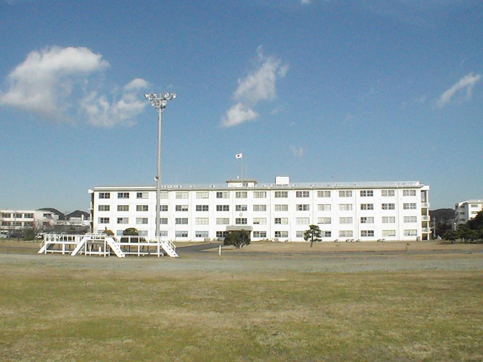 第1教育団創立記念行事当日、本人が撮影